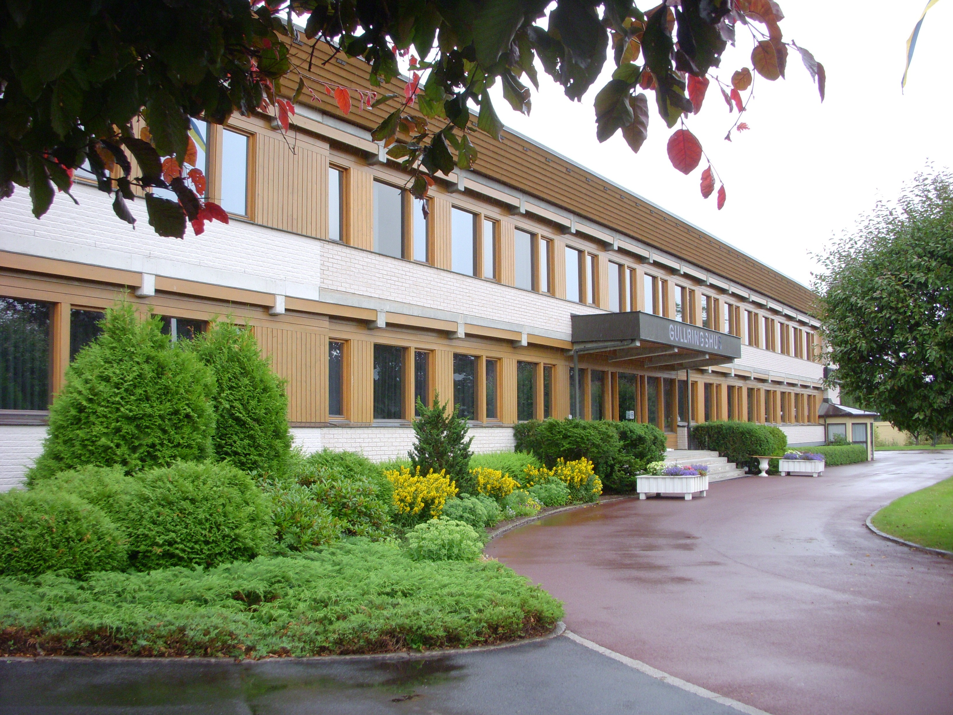 Gullringshus kontor i Gullringen